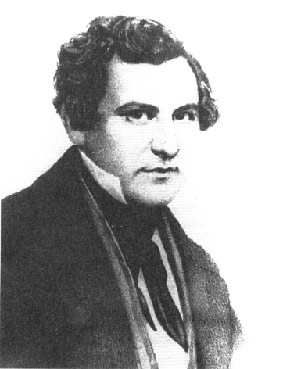 Wilhelm Loewe (1814–1886) Reproduktion Heimatverein Calbe/S. e.V.